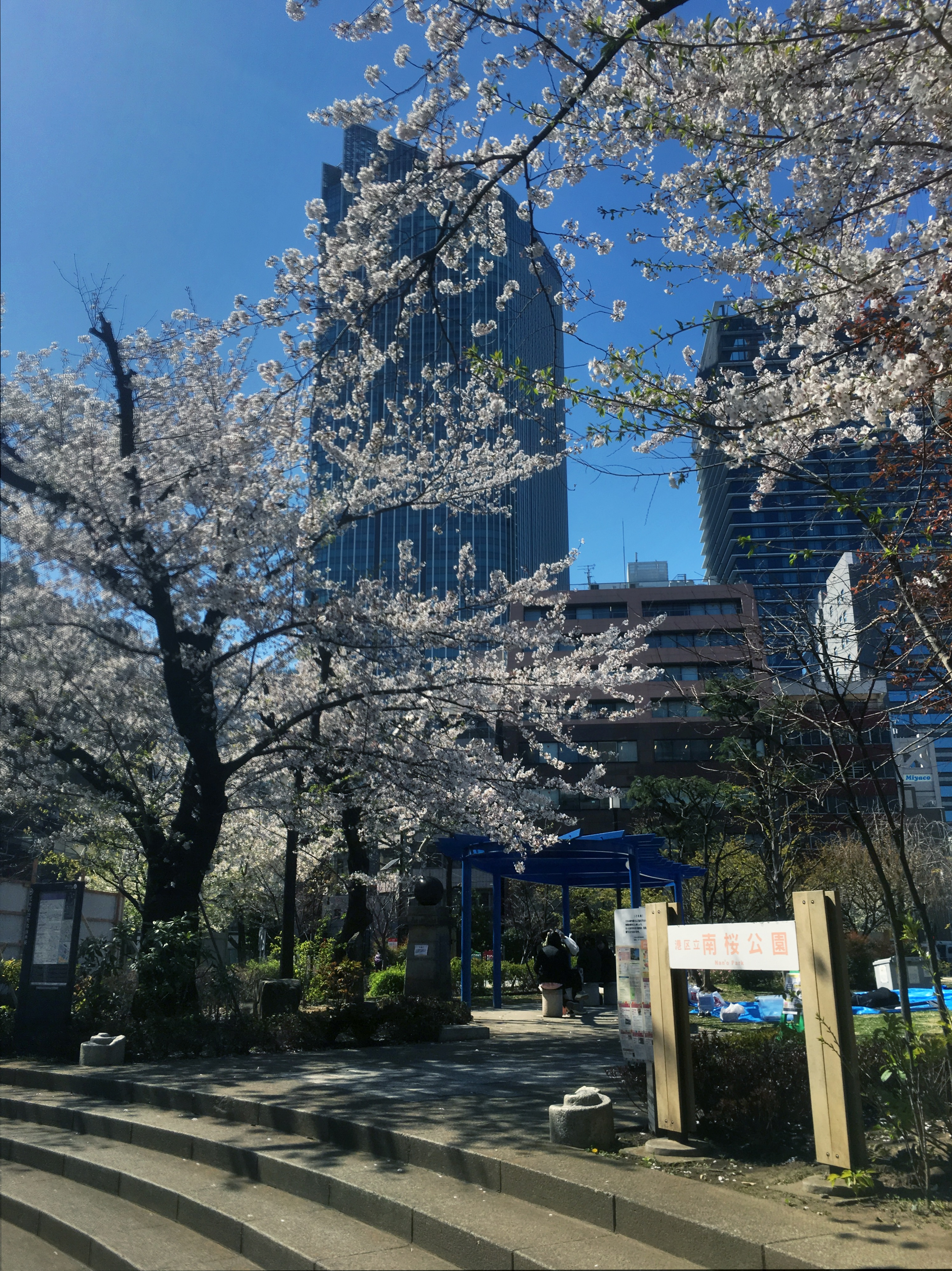 西新橋にある南桜公園